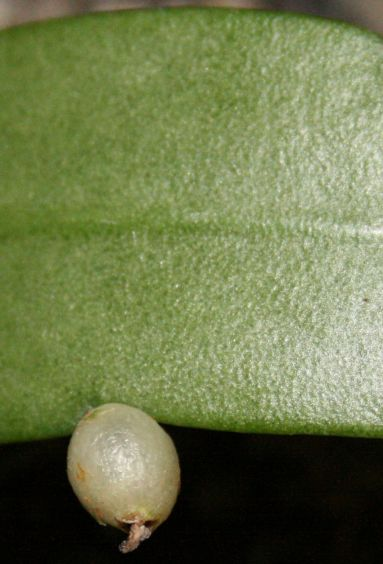 Pseudorhipsalis ramulosa termése